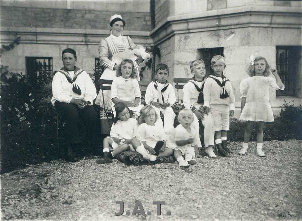 Los infantes y príncipes en el Palacio de la Magdalena (Colección José Antonio Torcido)